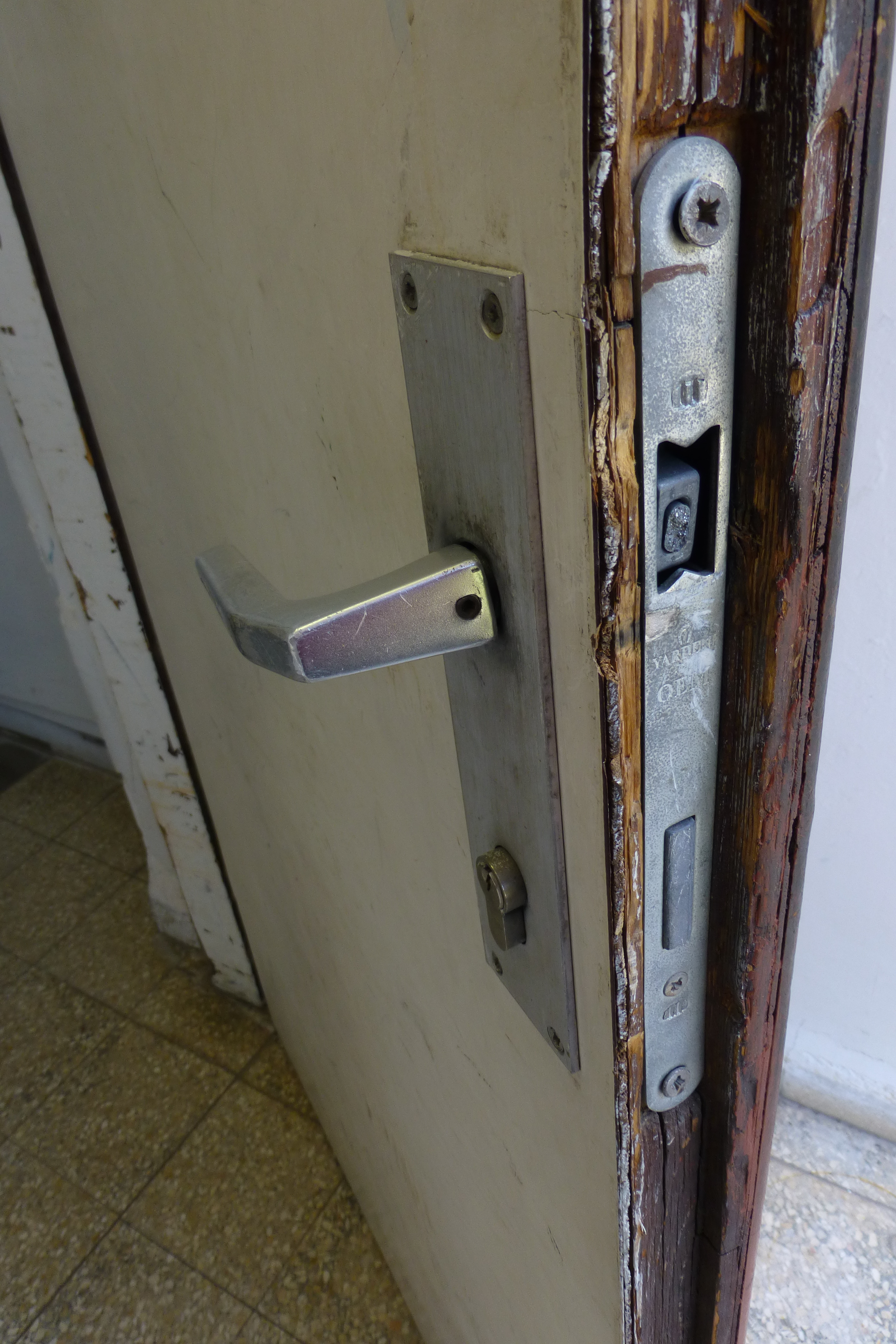 מוסד שומריה הוקם בשנת 1931 בקיבוץ משמר העמק והיה למוסד החינוכי הראשון של השומר הצעיר.